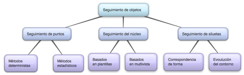 Esquema de las diferentes técnicas de seguimiento de objetos.